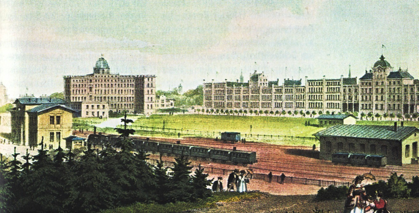 Bahnhof Sternschanze und Zollvereins-Niederlage in Hamburg, Lithographie von Wilhelm Heuer (1813-1890)